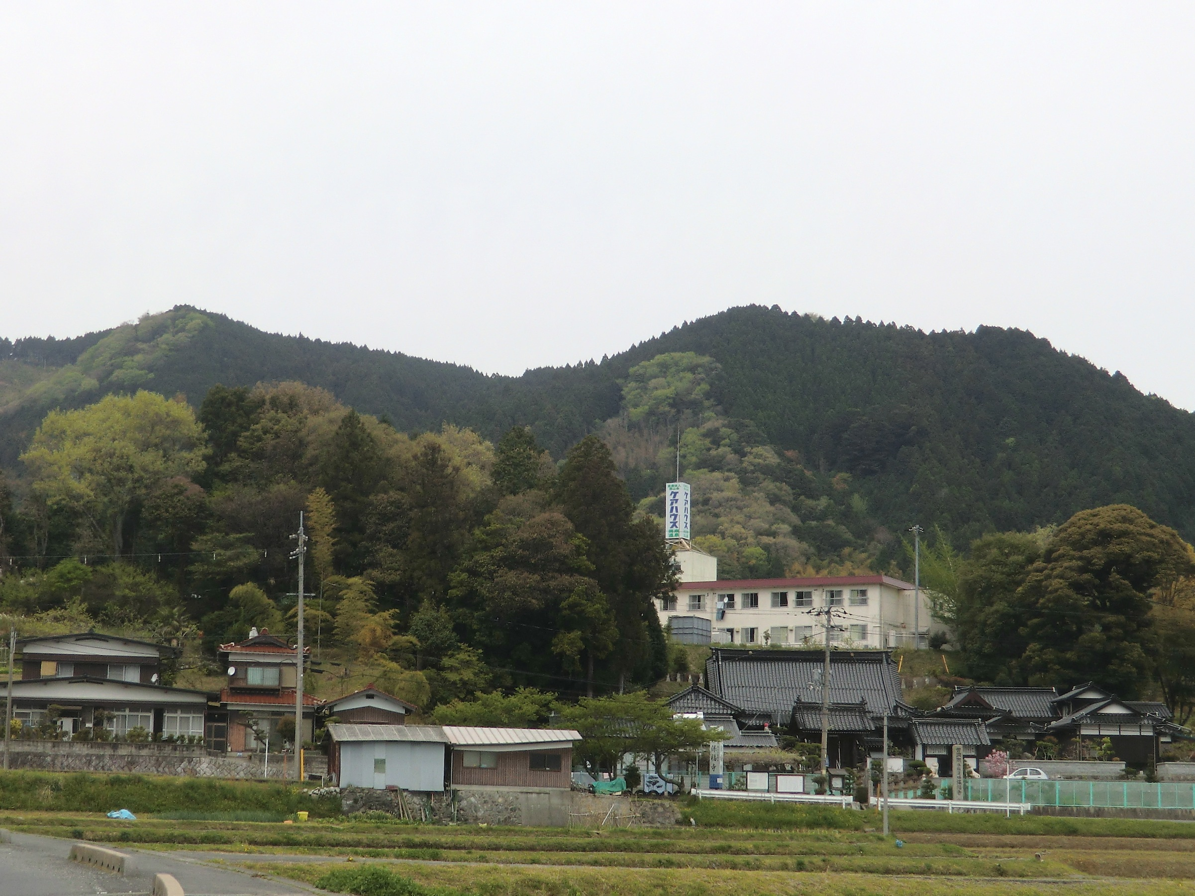 須々万沼城遠景と保福寺（山口県周南市須々万）